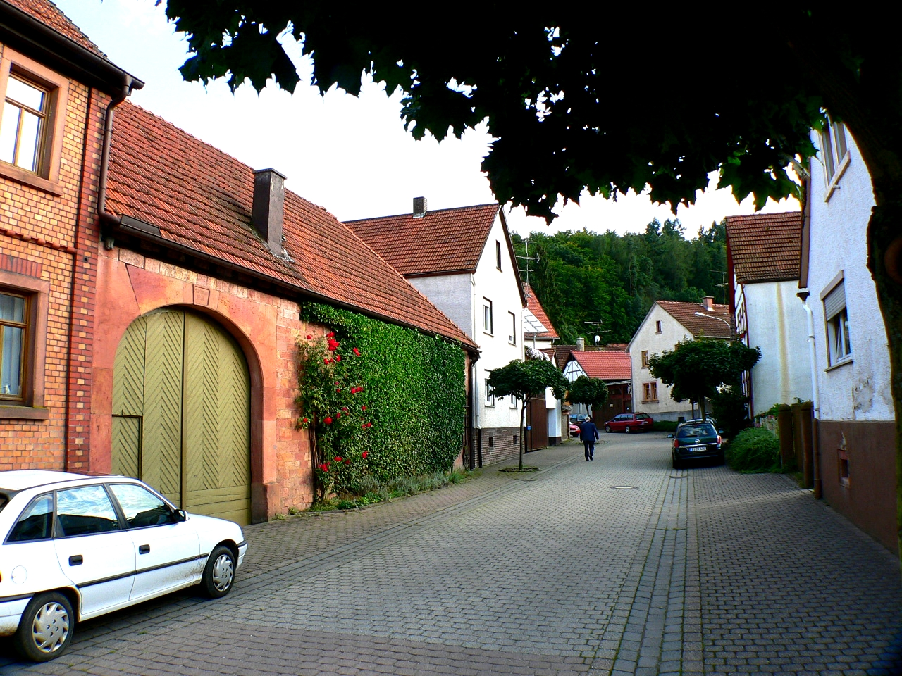 Dorndiel im Odenwald (zu Groß-Umstadt) - Dorfstraße